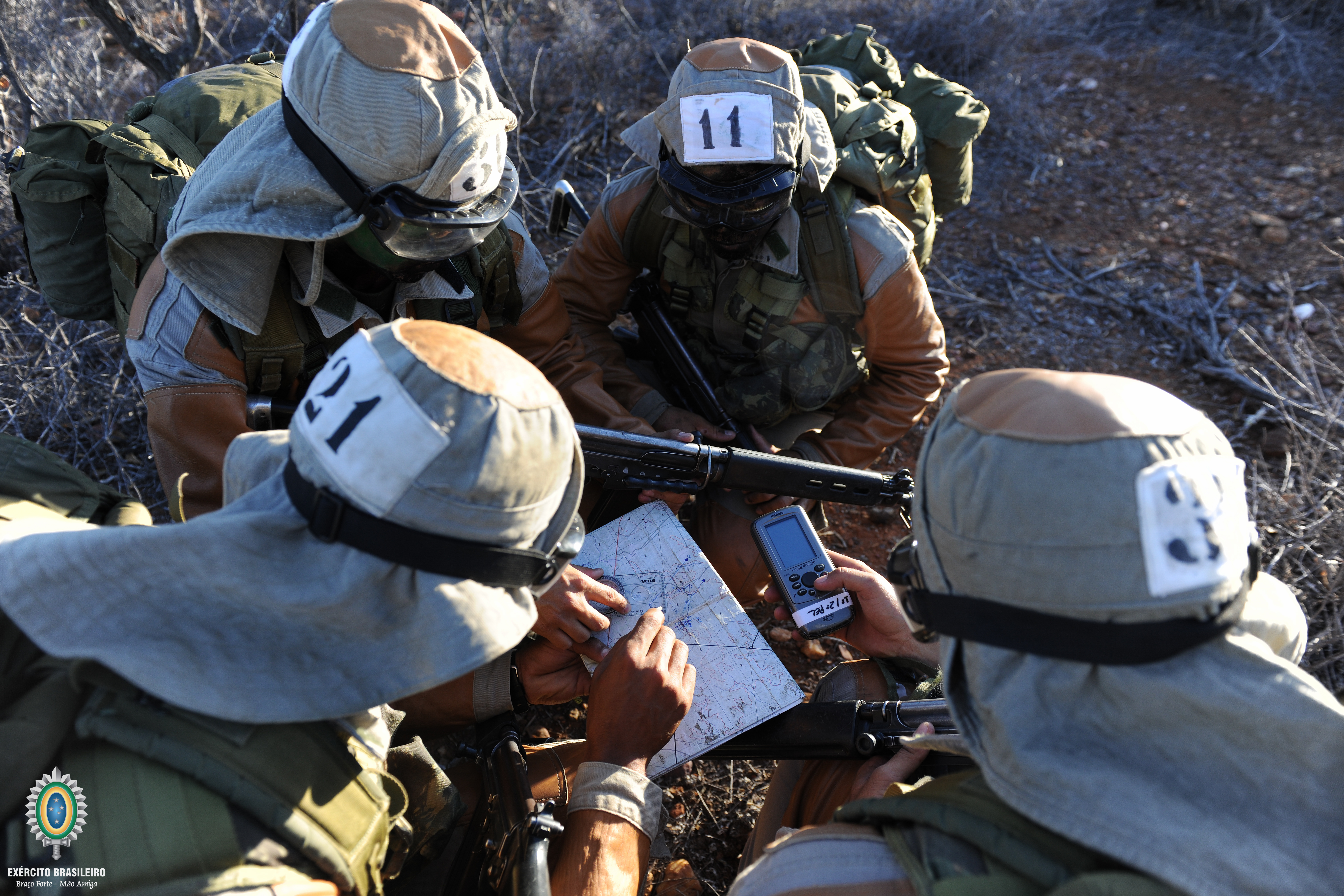 Foto: Ten Edvaldo/EB